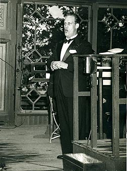 Folke Jonsson, Swedish opera singer at Skansen, Stockholm, Sweden.